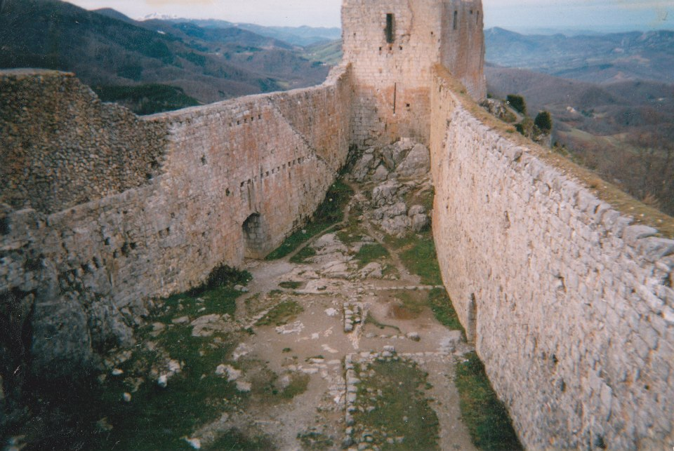 Kasteel van Montségur